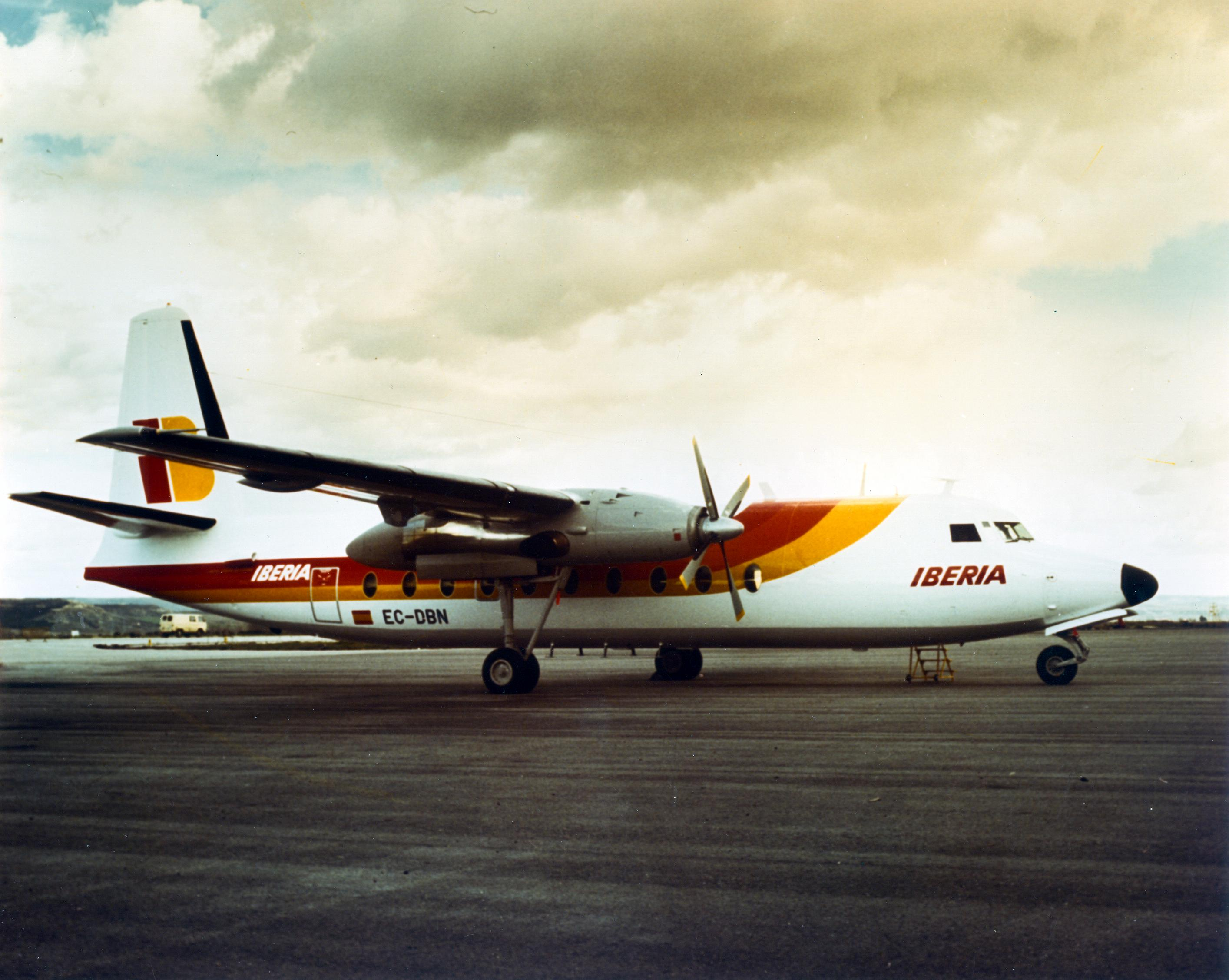 EC-DBN